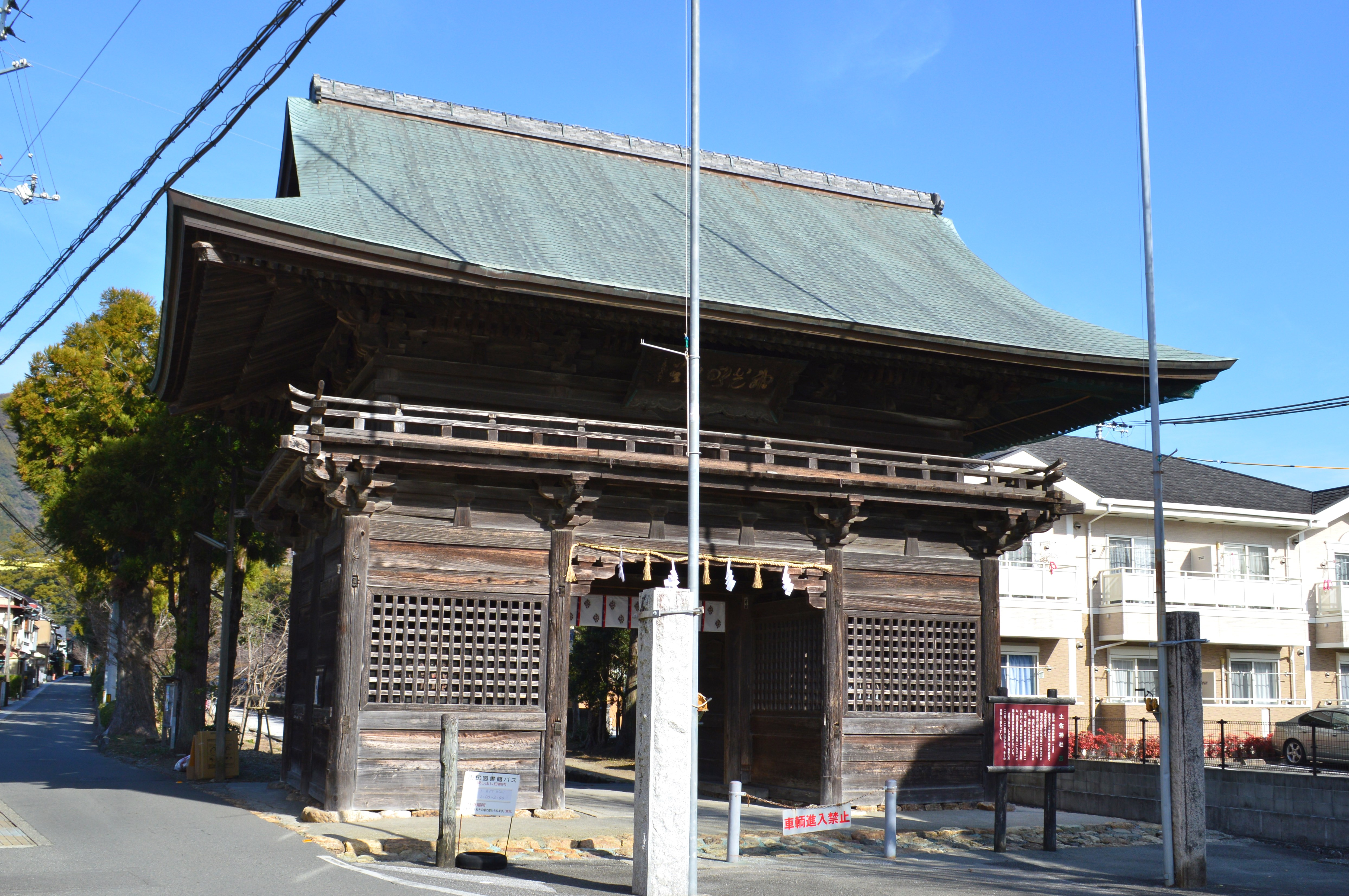 土佐神社 楼門